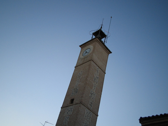 Consuegra